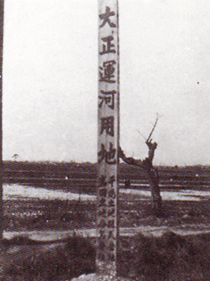 大正運河開削予定地（大阪市大正区）。下に千島・岩田土地株式会社と記載されているのが分かる。